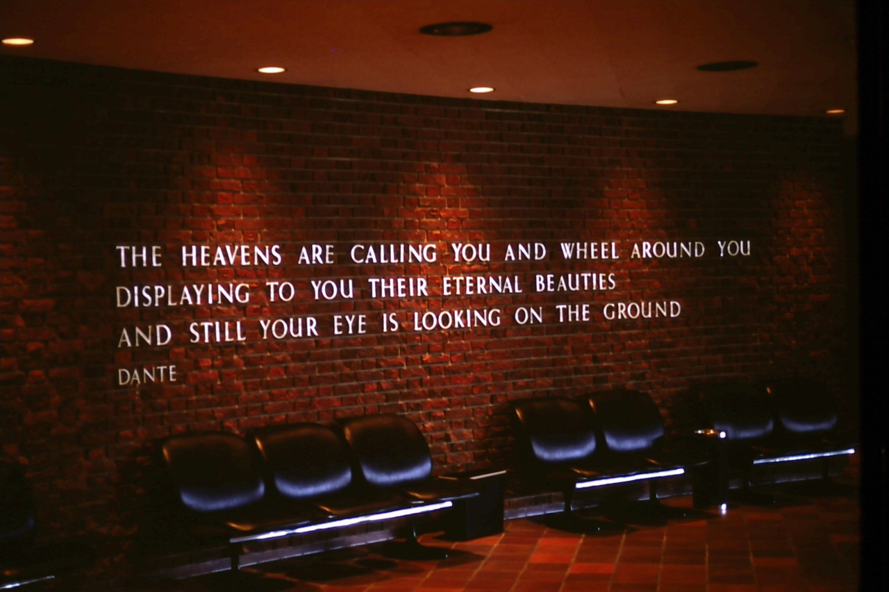 1973planetarium04